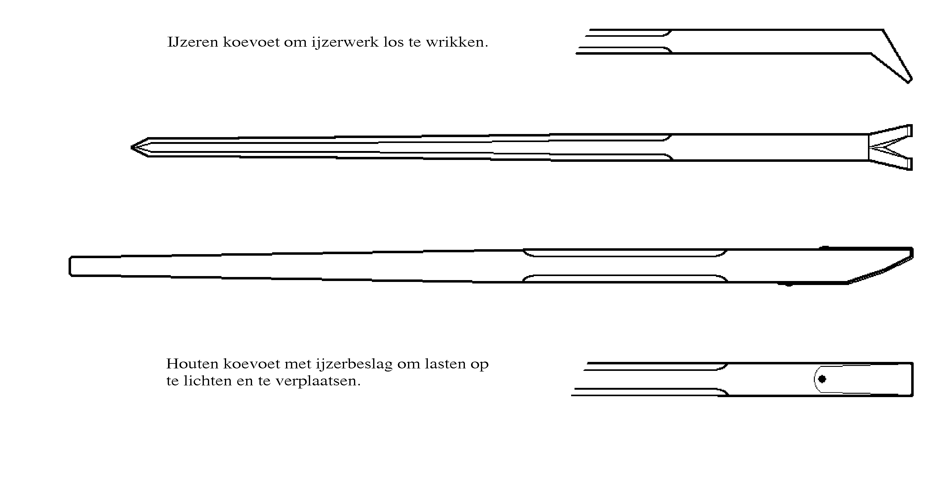 tekening van twee koevoeten